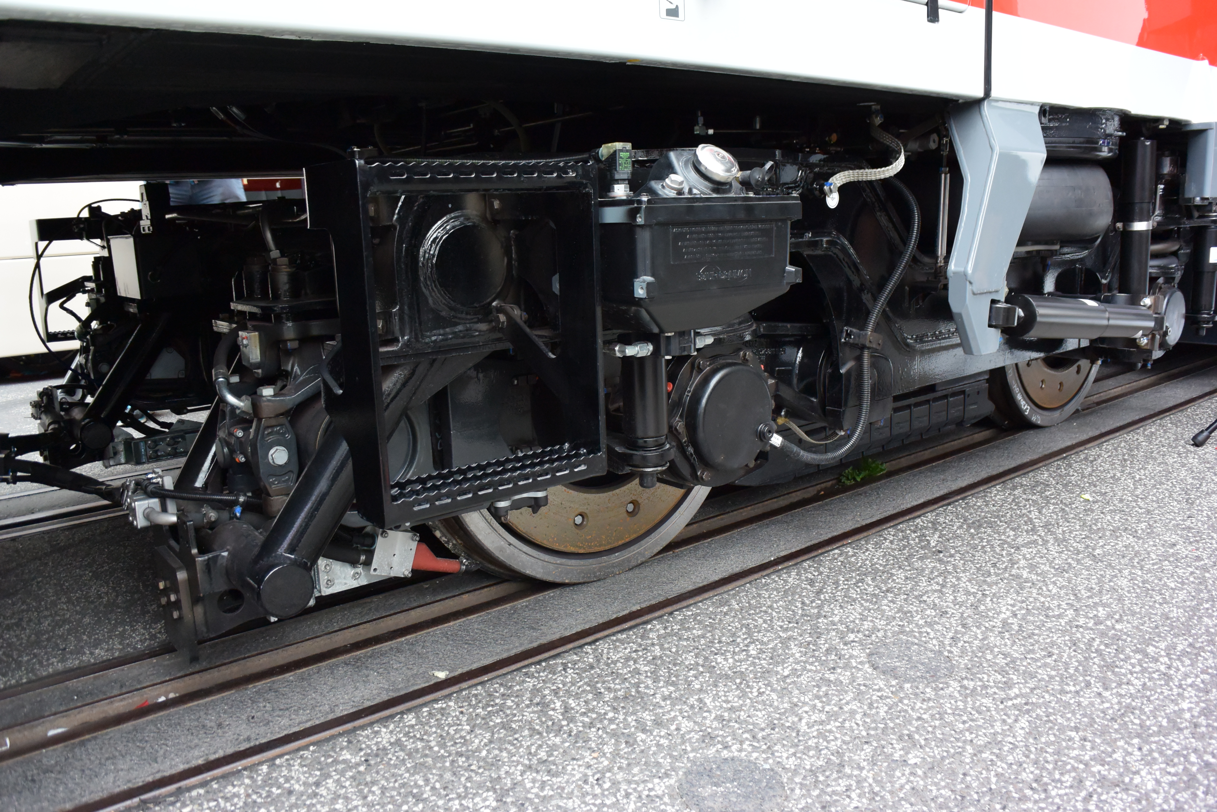 Wózek PESA Link DB podczas InnoTrans 2014